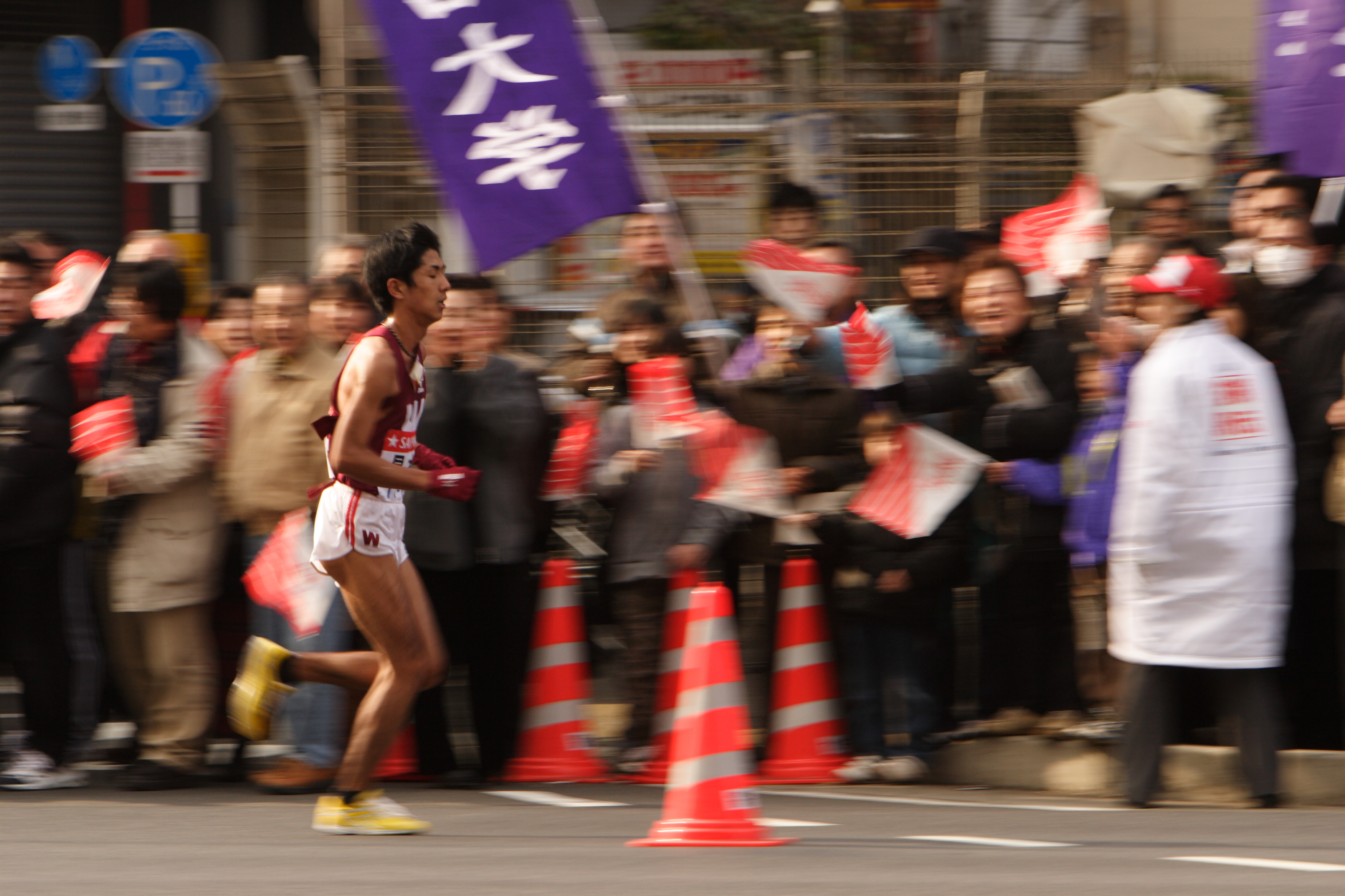 Map 2007 Hakone Ekiden 10th Leg